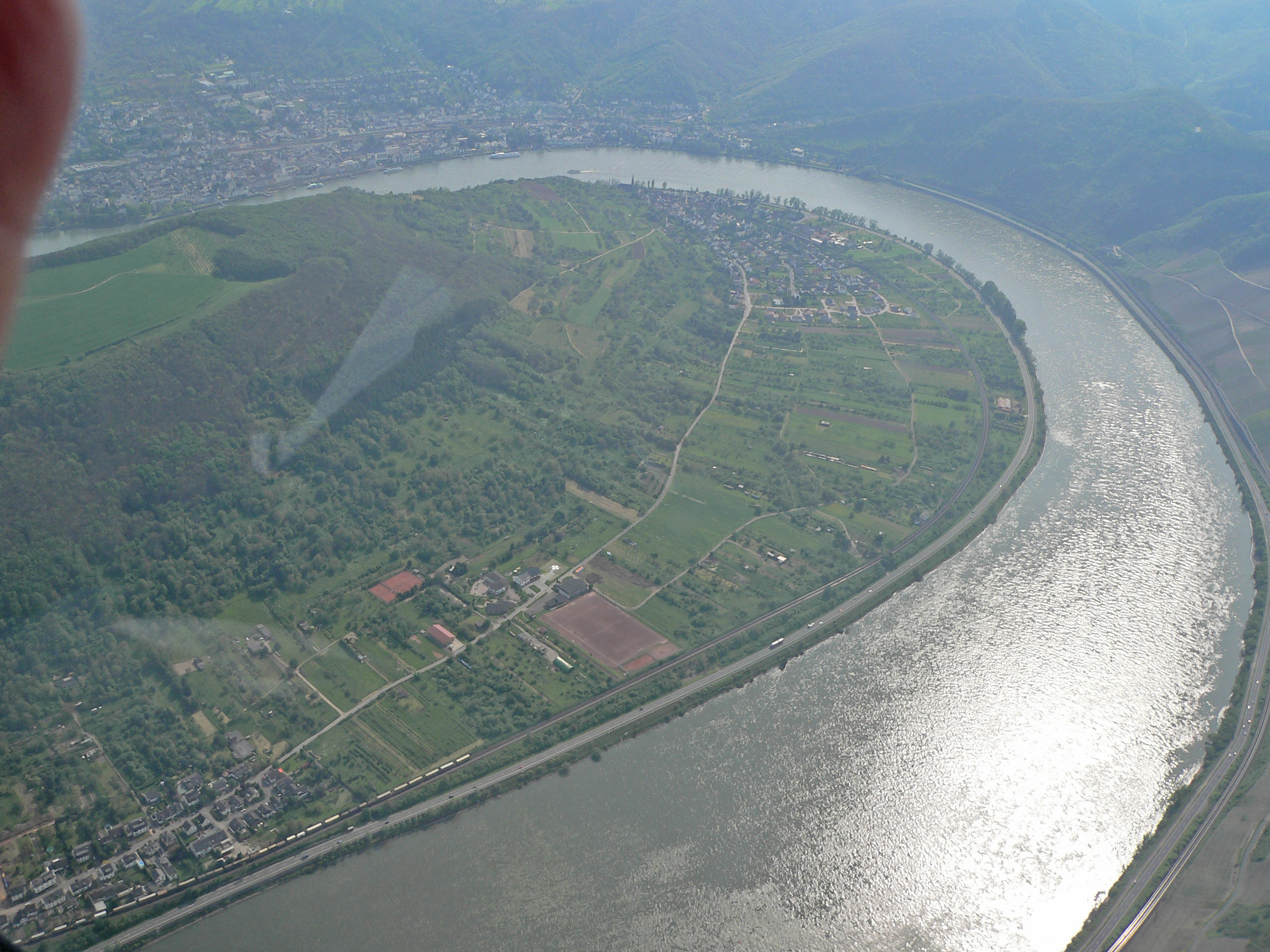 Luftaufnahme von Filsen, Osterspai, Boppard